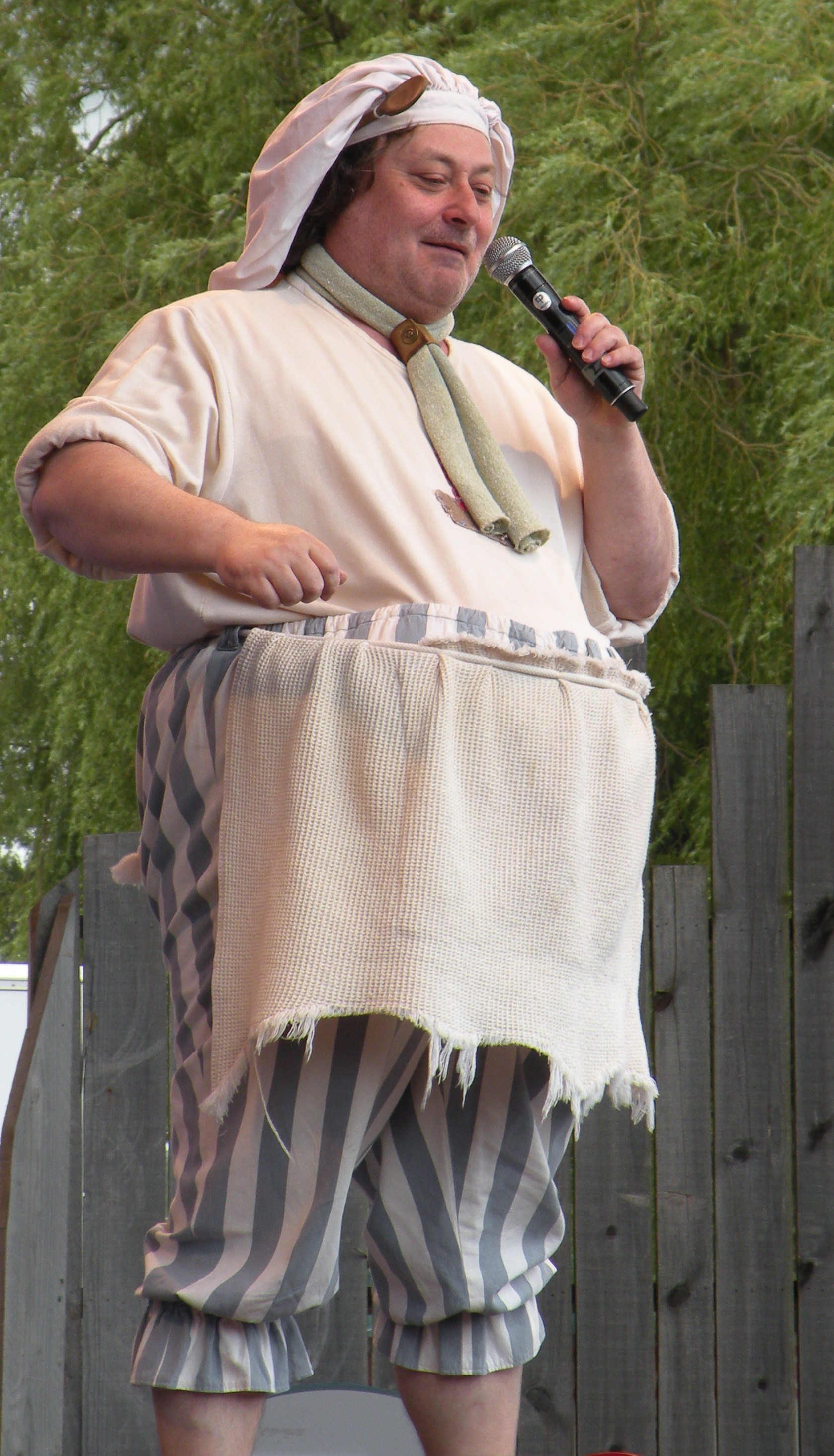 Dirk Bosschaert als Berend Brokkenpap tijdens een optreden op het dorpsplein van Plopsaland De Panne in België